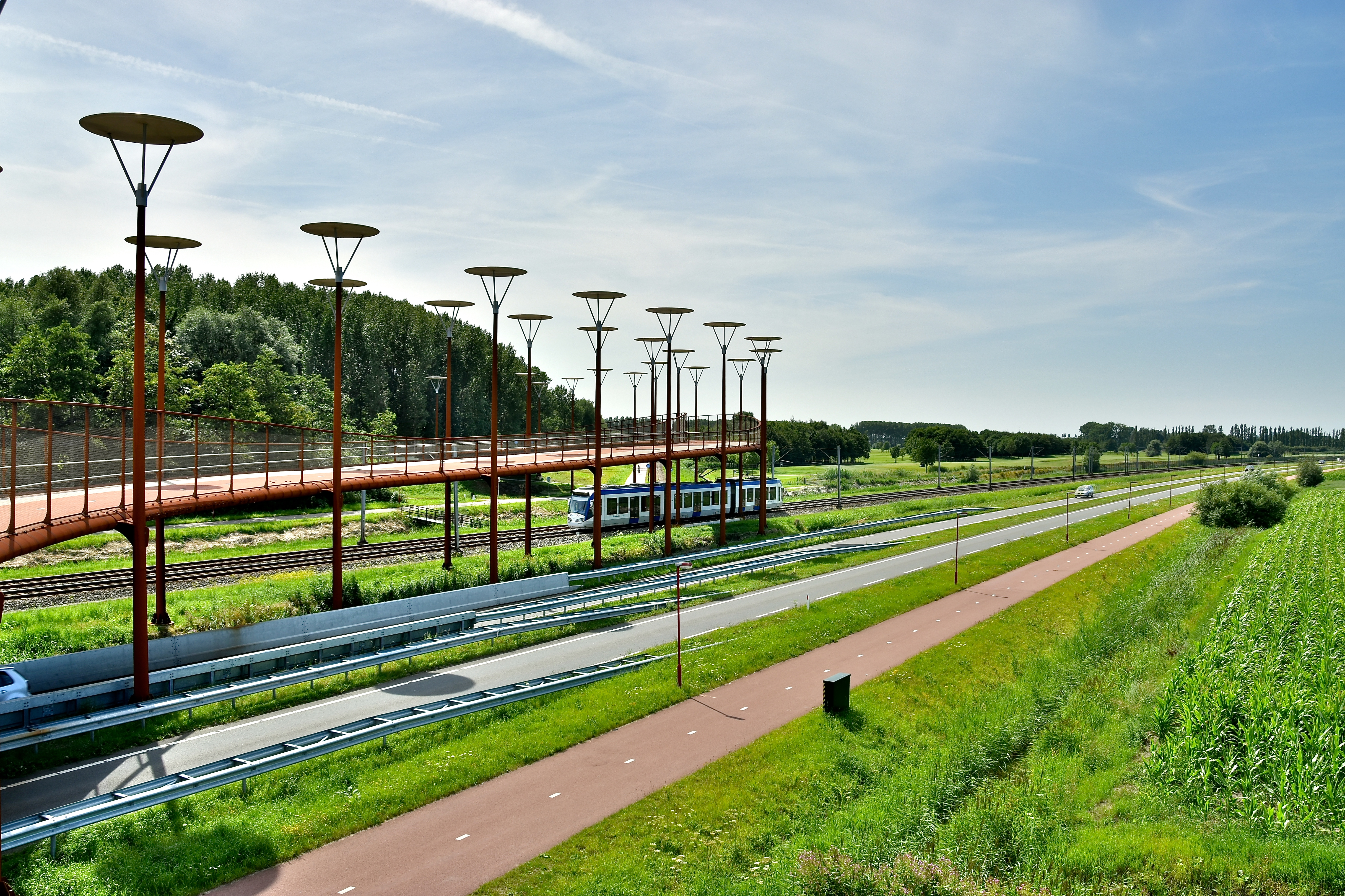 Verbindingsweg tussen Zoetermeer en Den Haag ter hoogte van de Burgemeester Waaijerbrug (fiets- en voetgangersbrug).